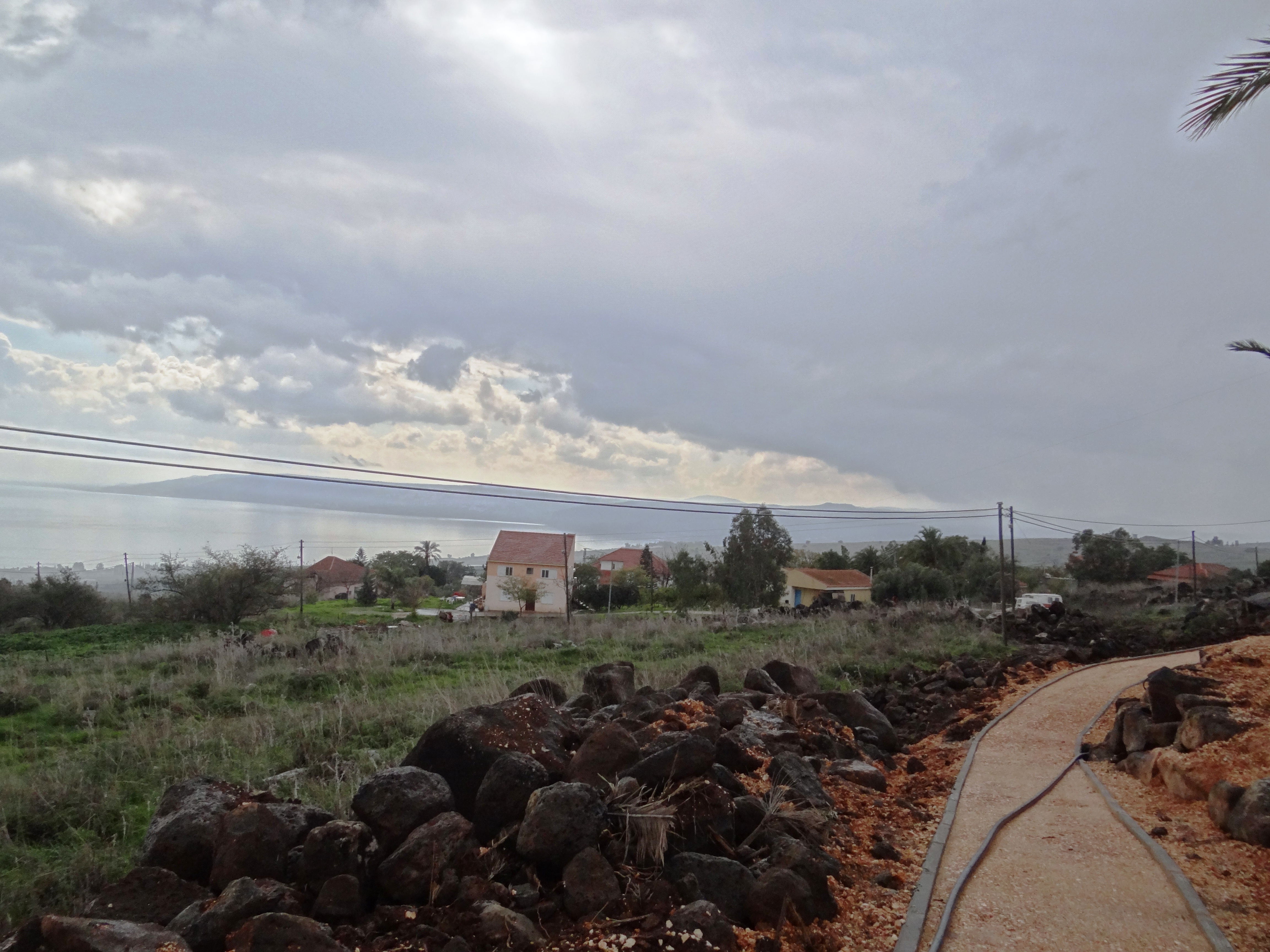 Amnun is a workers' moshav in the Upper Galilee in northern Israel. אַמְנוּן הוא מושב עובדים ברמת כורזים, מצפון לכפר נחום ולימת הכנרת, בתחום המועצה האזורית מבואות החרמון.